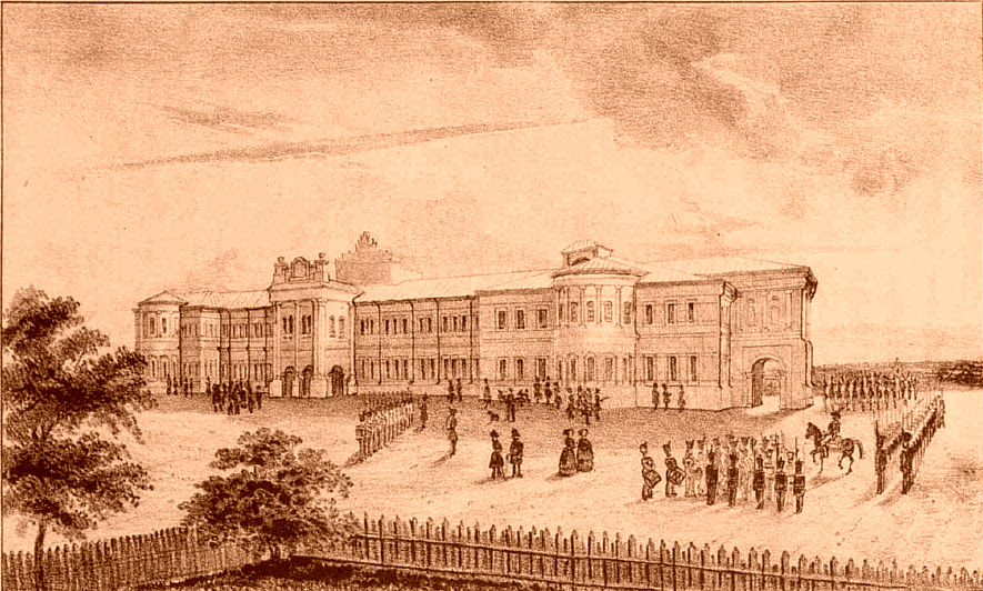 Procesiune militară în capitala Moldovei la început de secol XIX